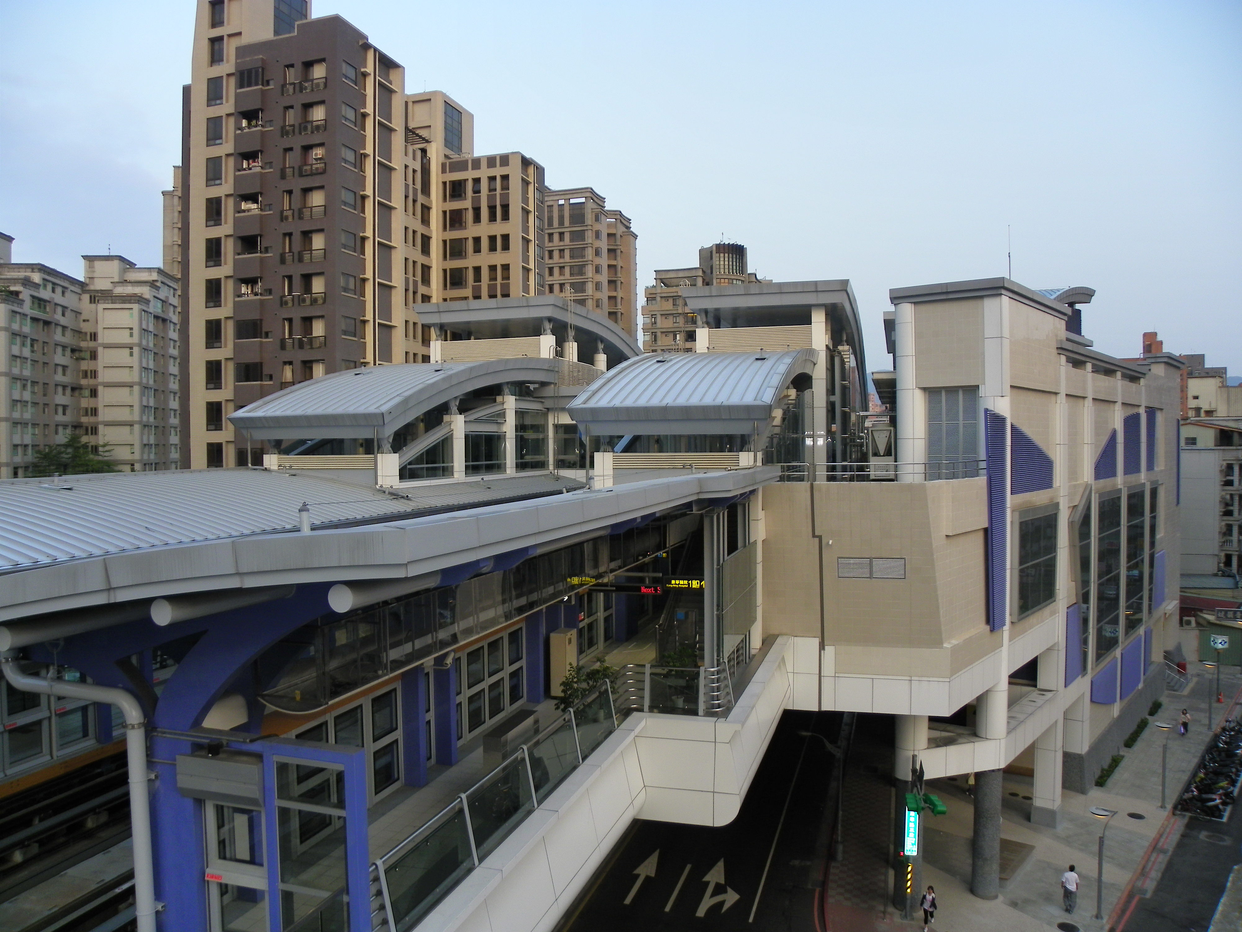 台北捷運内湖線葫洲駅の駅舎。